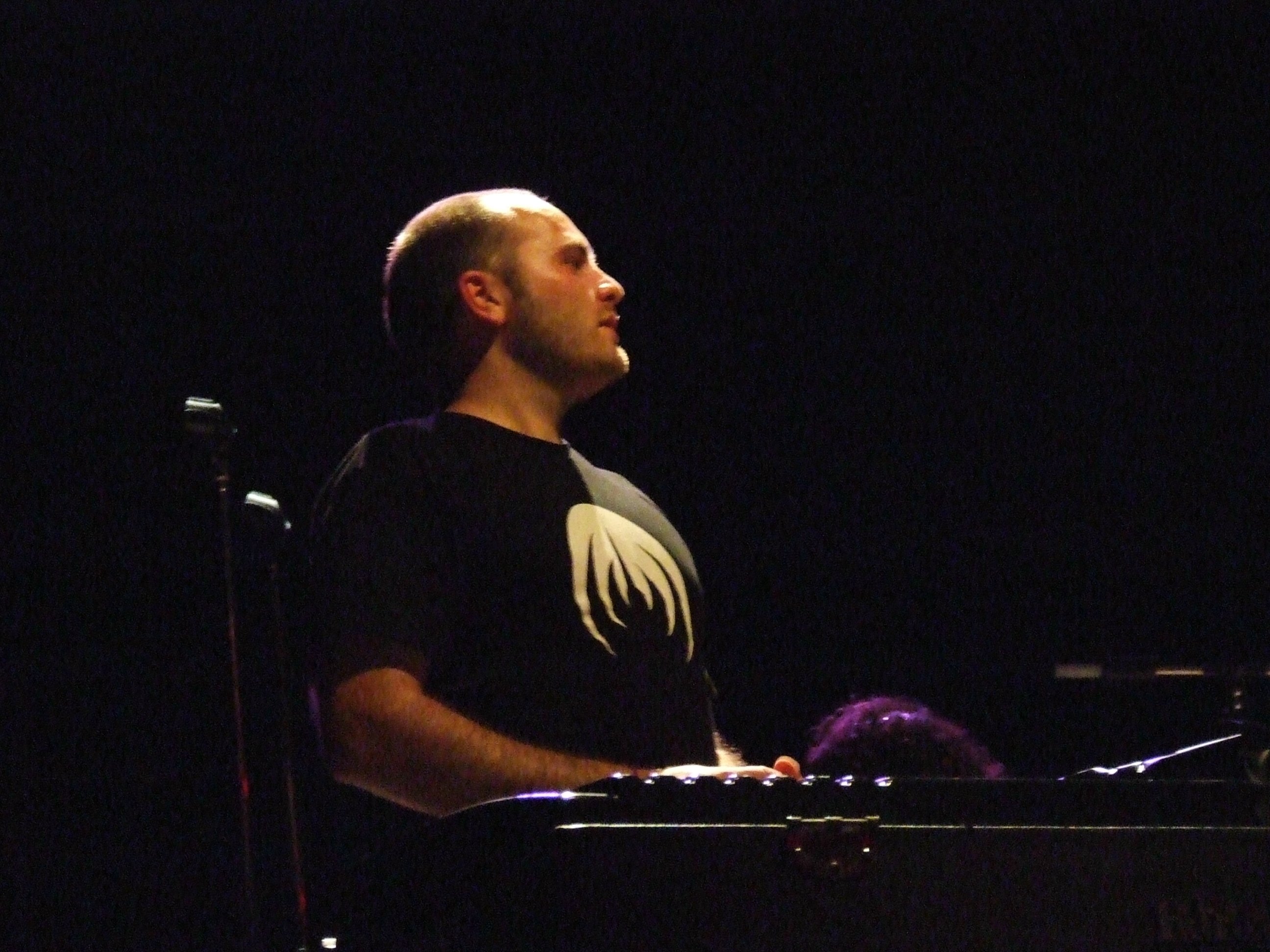 Photo du concert de Magma à la salle des Fetes de Schiltigheim